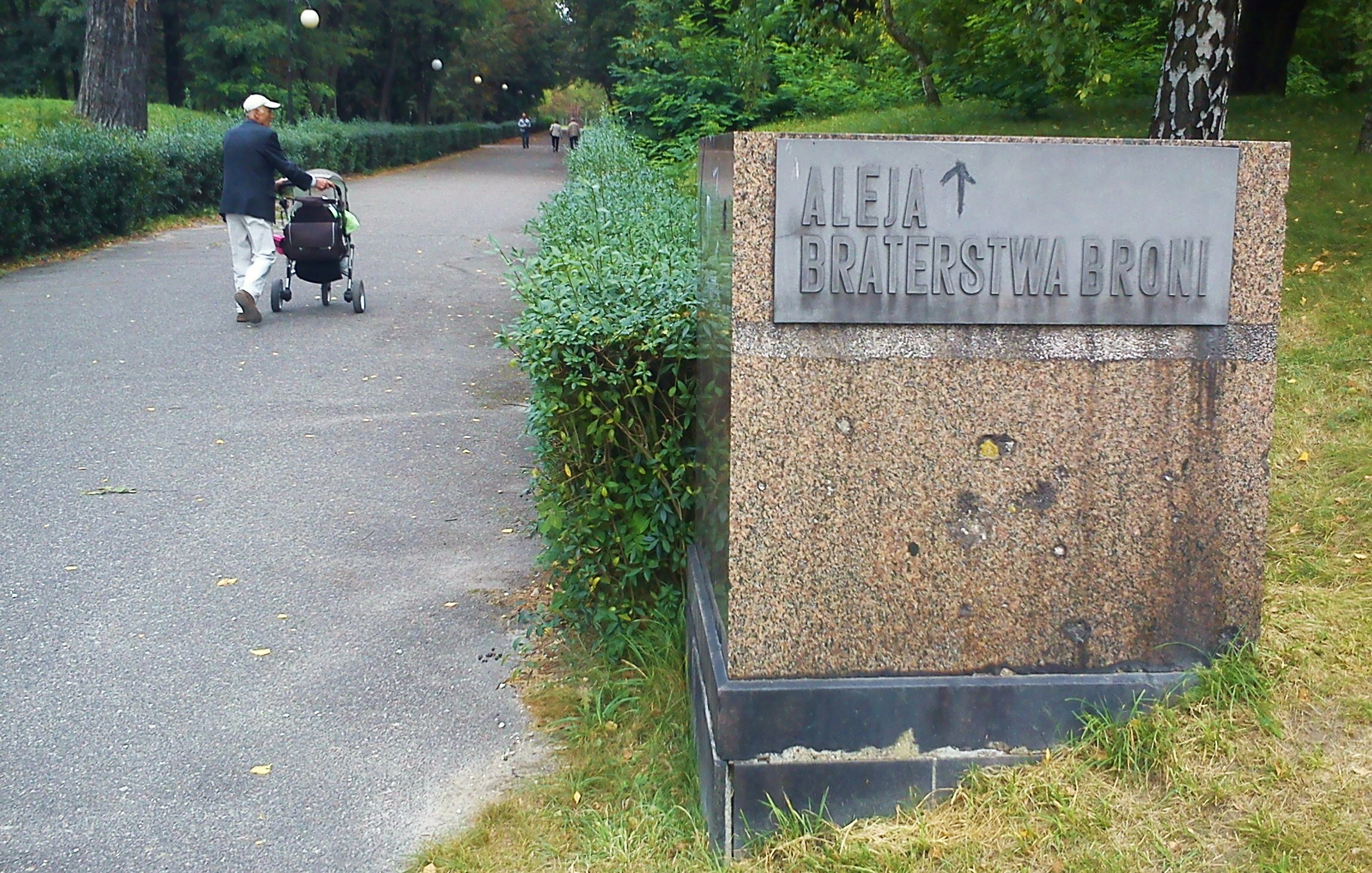 Cytadela, Poznań. Aleja Braterstwa Broni.